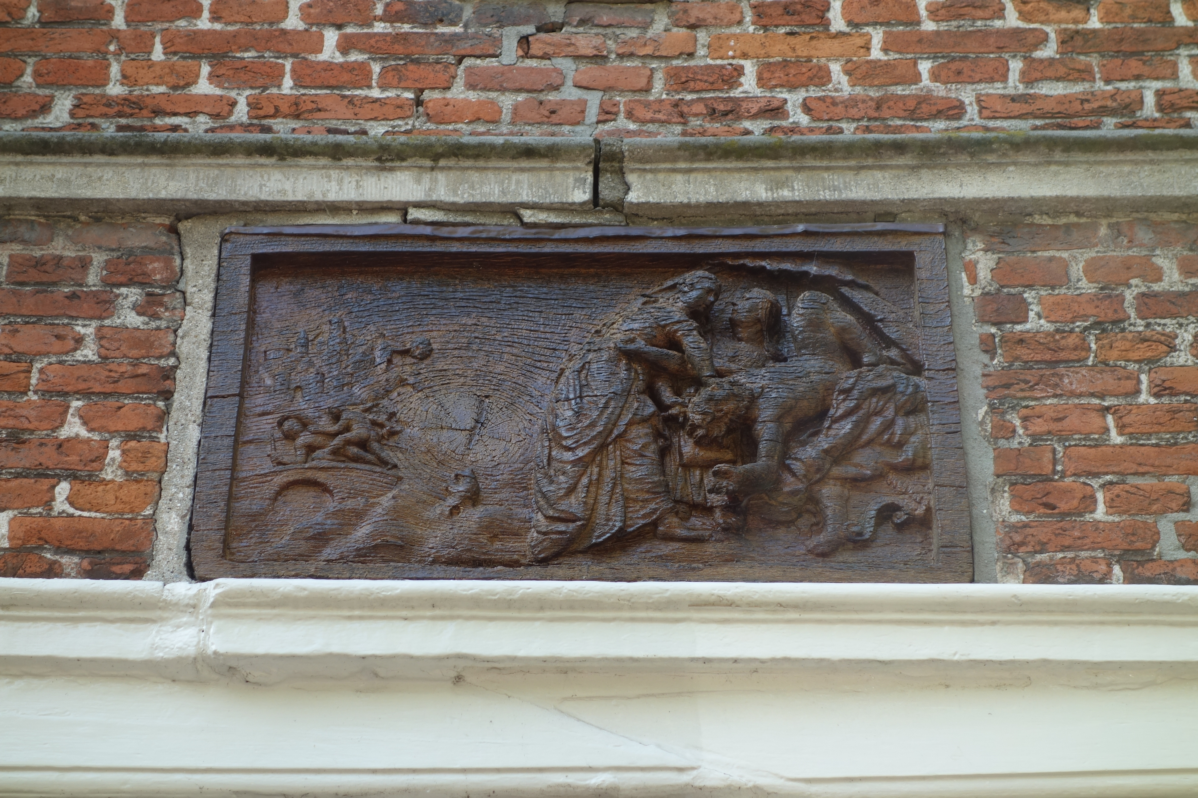 Gevelsteen in de gevel van de panden Munnickenveld 15 en 17. Voorstellende Judith die Holofernes onthoofd.